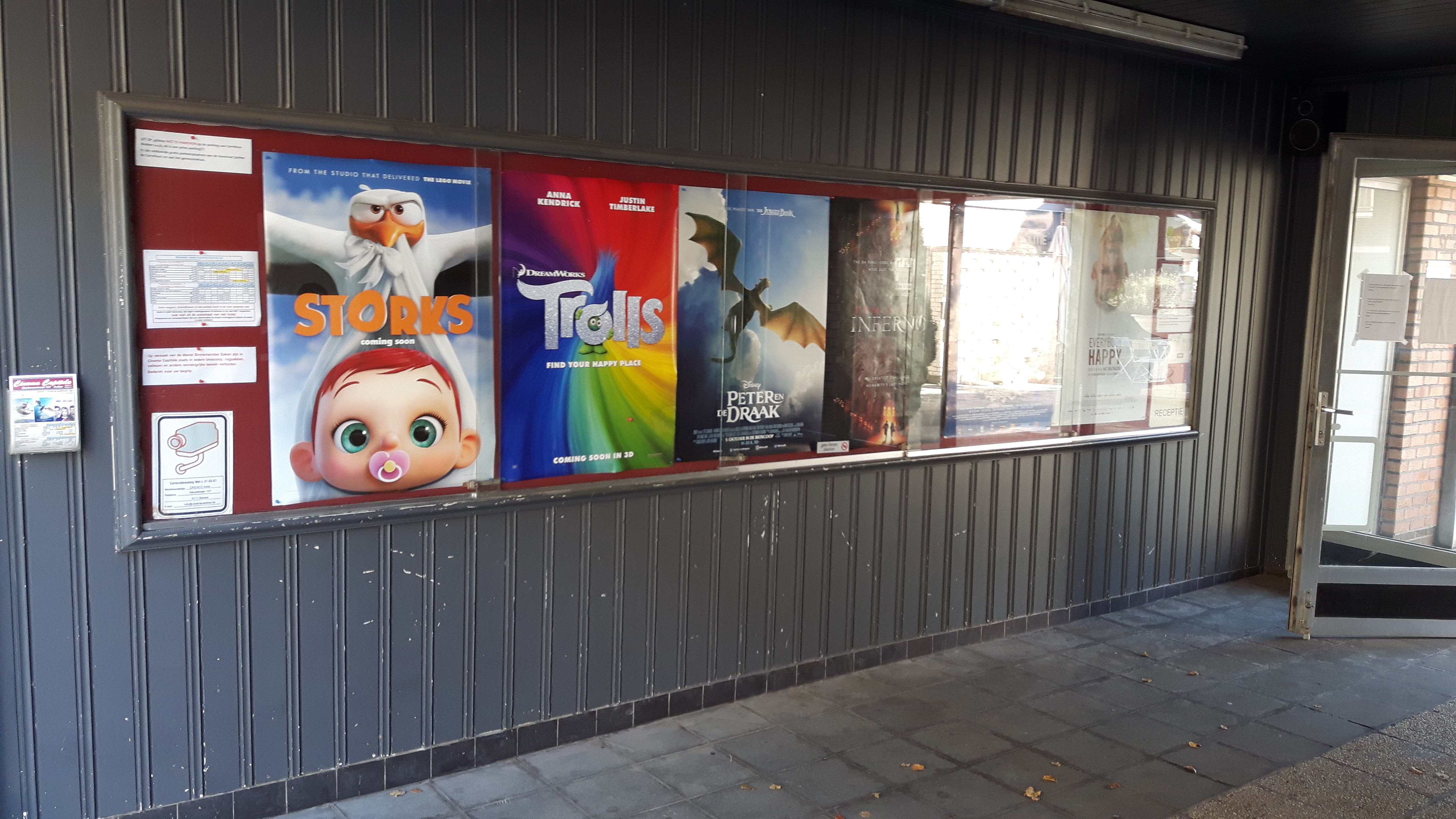 Cinema Capitol - affiches van de gespeelde films